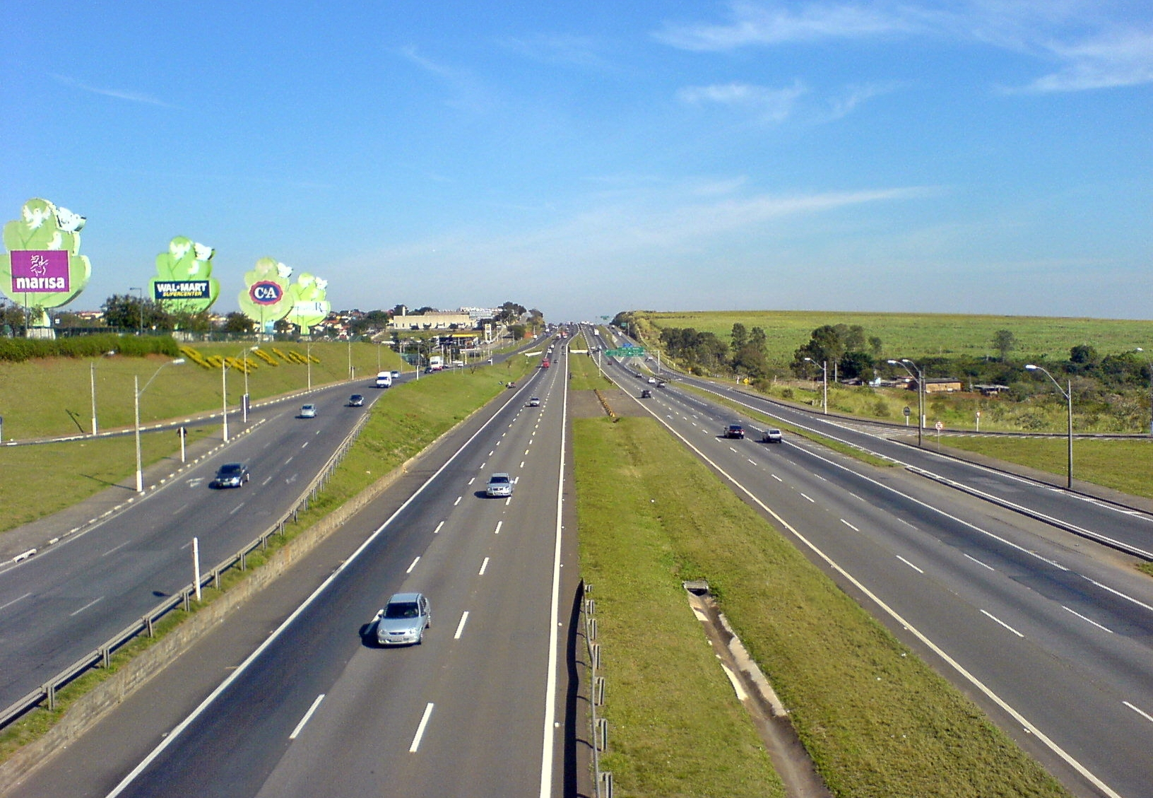 Rod. Dom Pedro